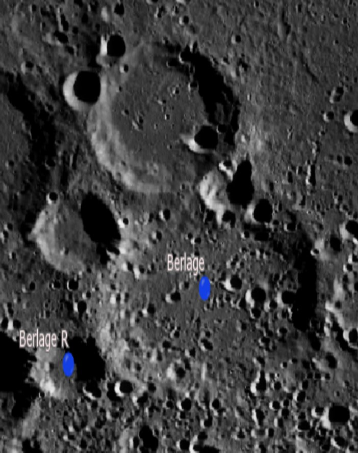 Cráter lunar Berlage. Cráteres satélite. (Imagen LRO)